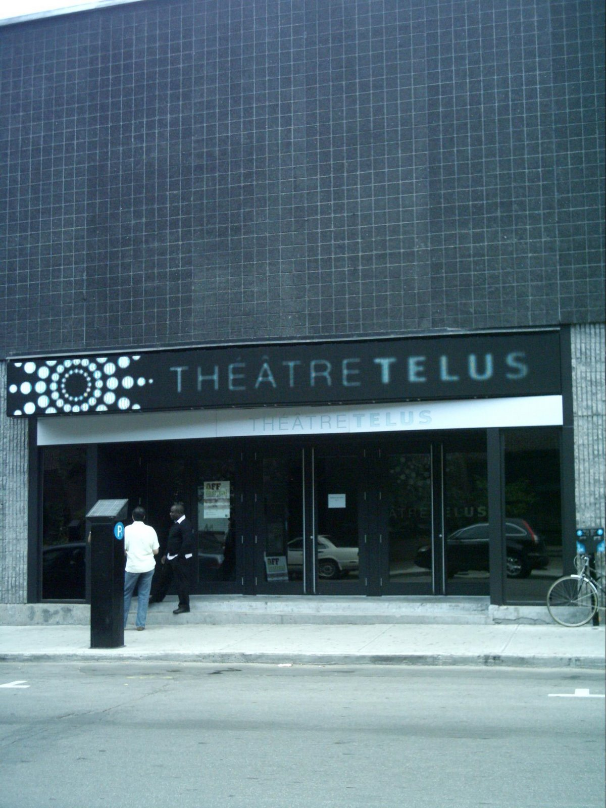 Le Théâtre Telus est situé au 1280 rue Saint-Denis à Montréal. Il peut accueillir jusqu'à 1200 personnes.